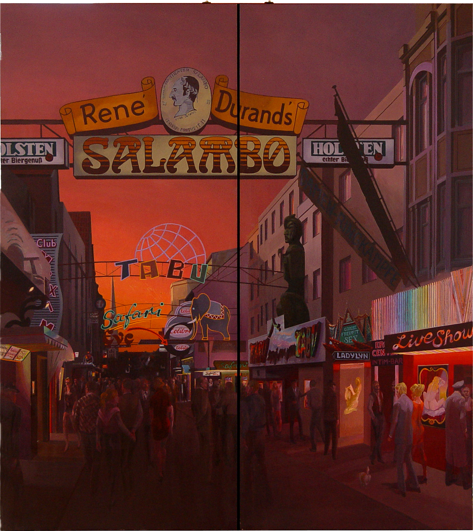 Frontseite eines Triptychons mit dem Titel "Kontakthof" (Ölmalerei auf Holz, 1989/90) des Hamburger Malers Otto Ruths. Blick in die Straße Große Freiheit in Hamburg, entstanden nach einer fotografischen Vorlage aus dem Jahre 1989.